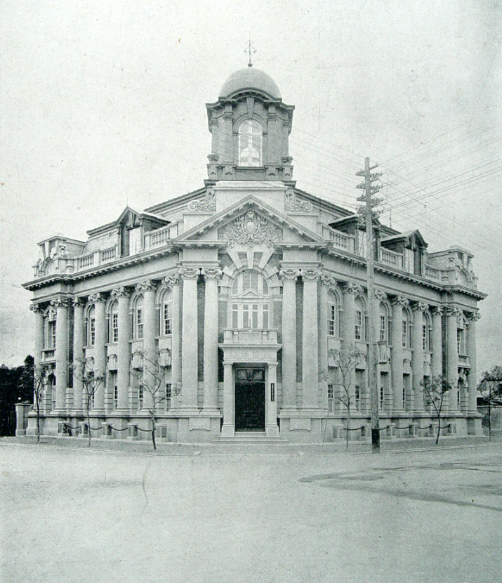 帝國生命台北支店舊廈，於1936年拆除改建